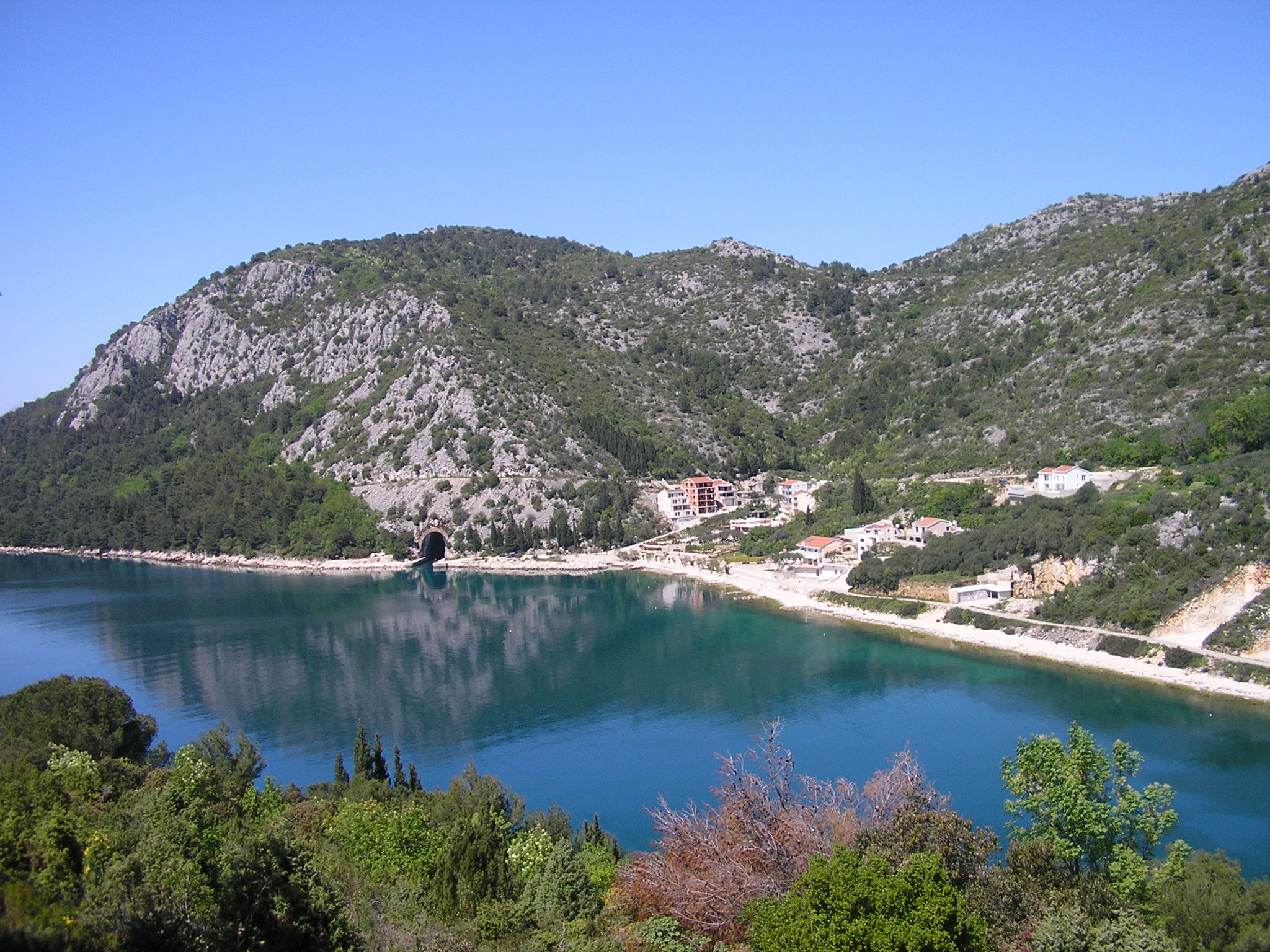 Duba